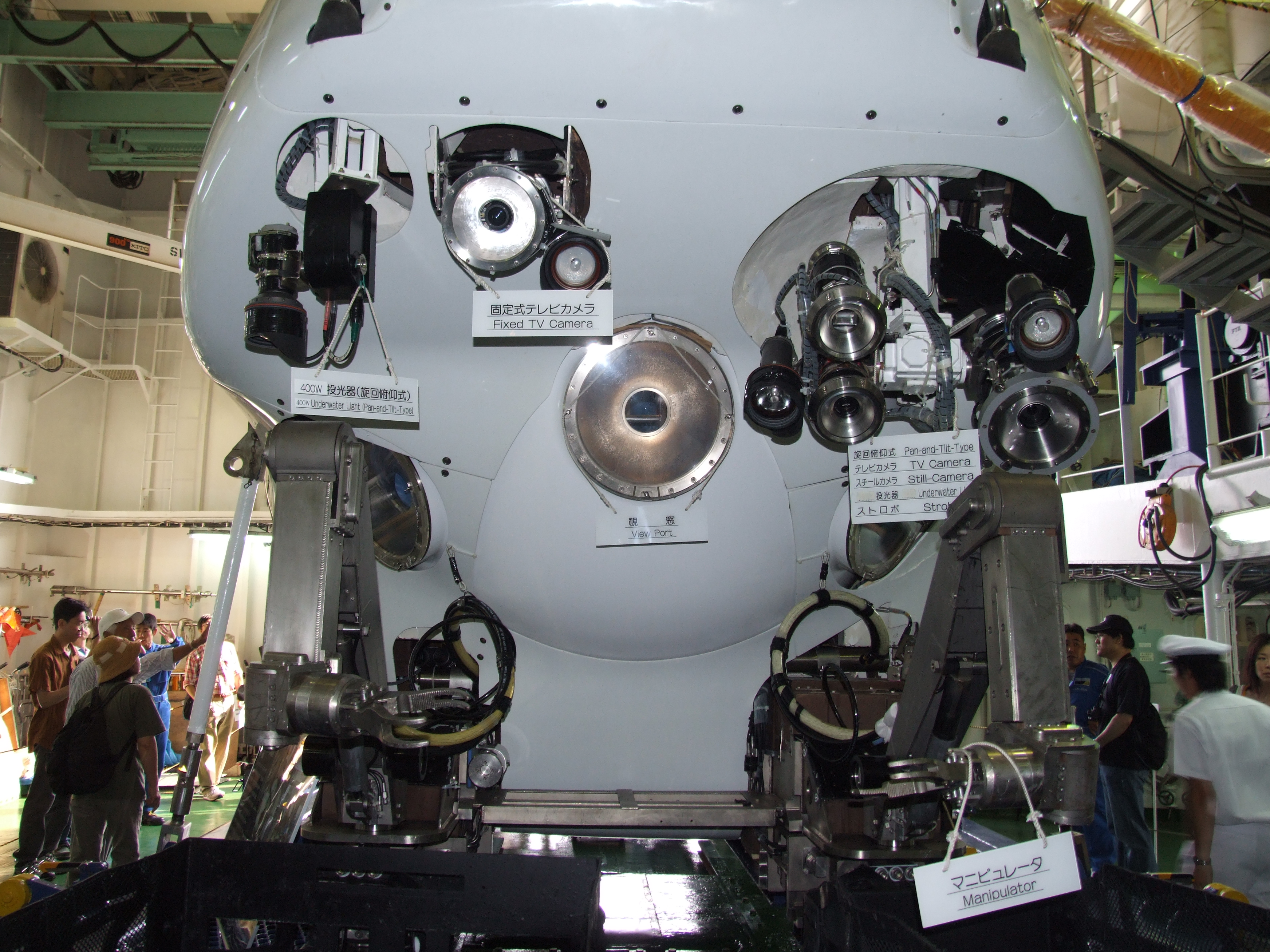 前部のマニピュレータとカメラ（横浜港開港150年での母船よこすかの船内開放での撮影）